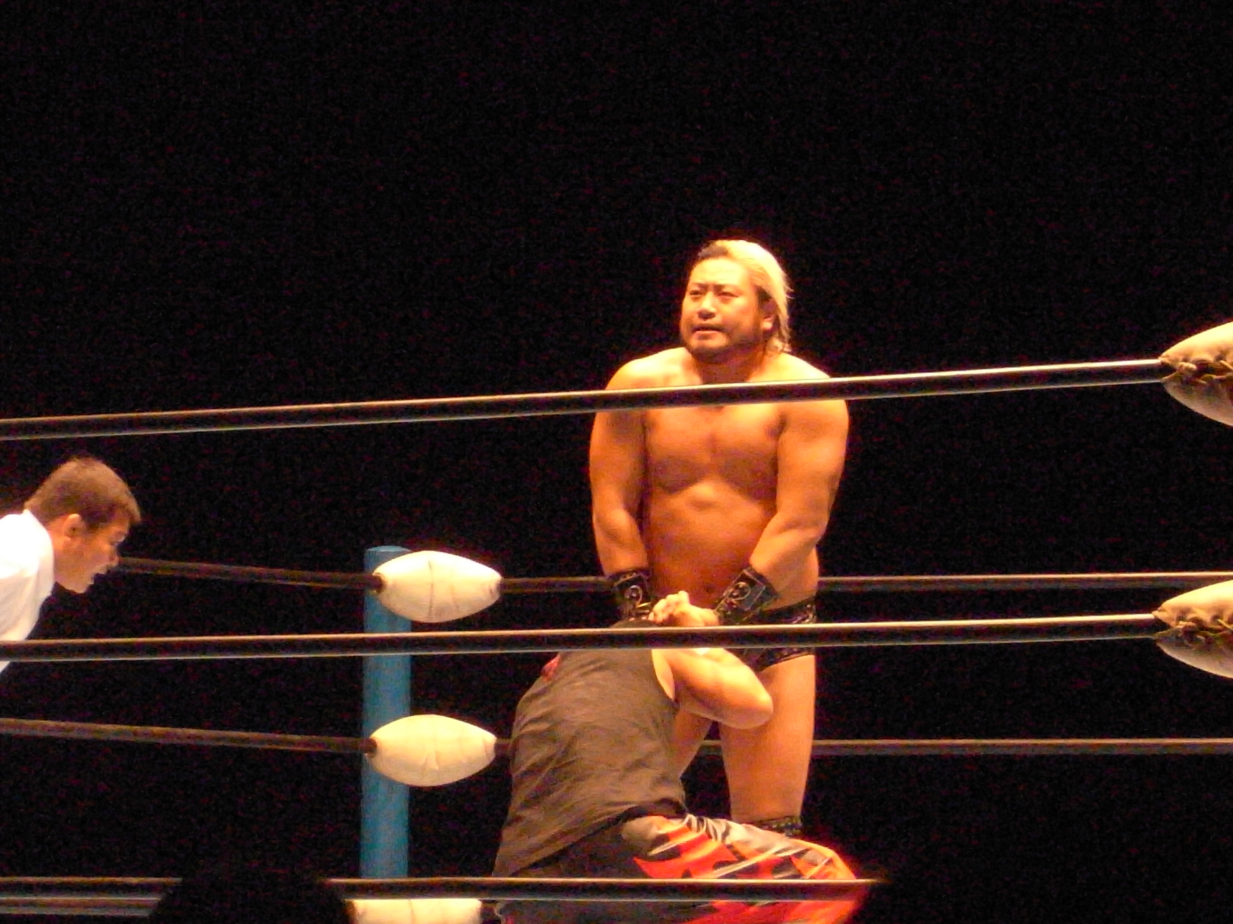 Suwama (Japanese Prowrestler) , Taiwan, 2008